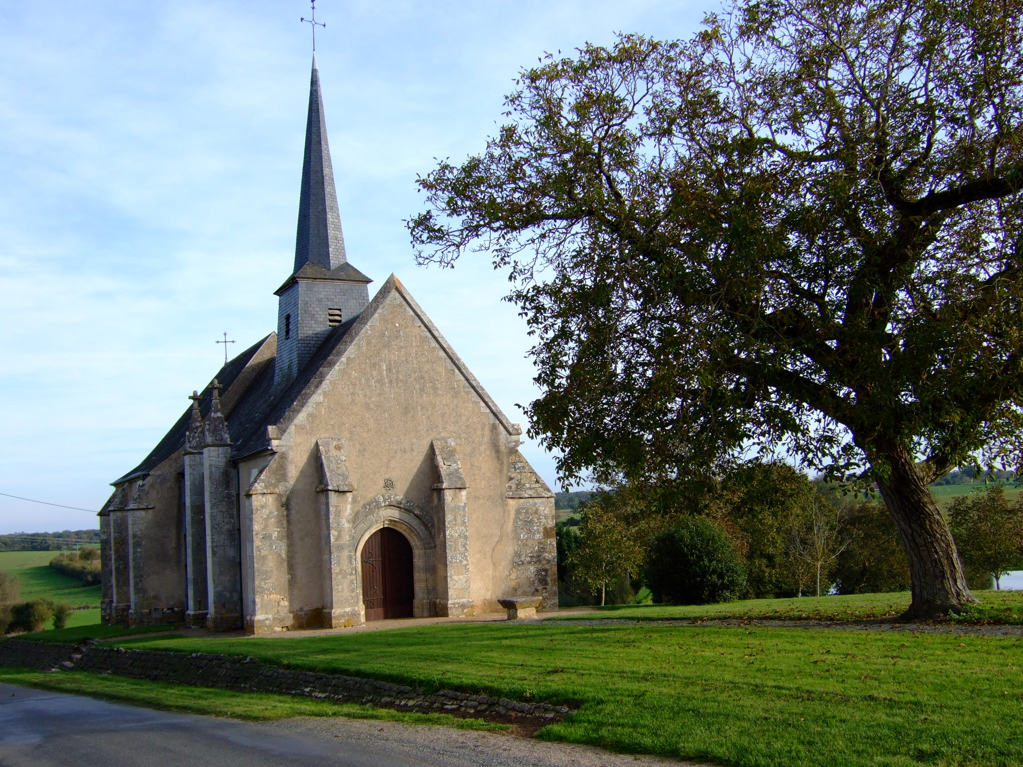 L'église d'Orcenais - Photo amateur prise par moi-même.